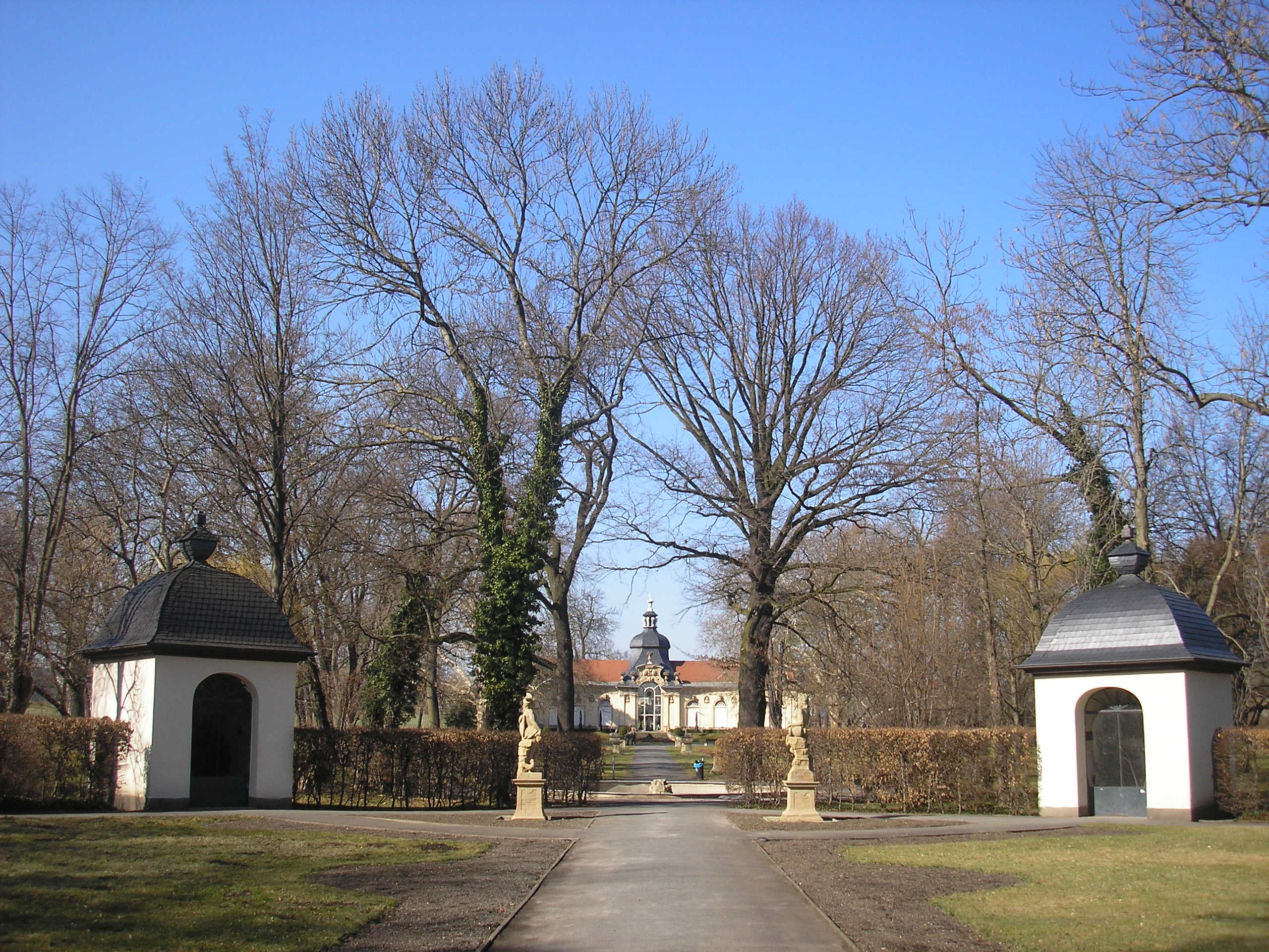 Gesamtansicht des Parks in Meuselwitz (Thüringen). In der Mitte die Orangerie, rechts und links Vogelvolieren, davor Statuen von Merkur und Neptun.